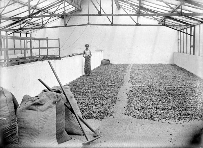 Negatief. Cacao in het drooghuis op de onderneming Silowok Sawangan